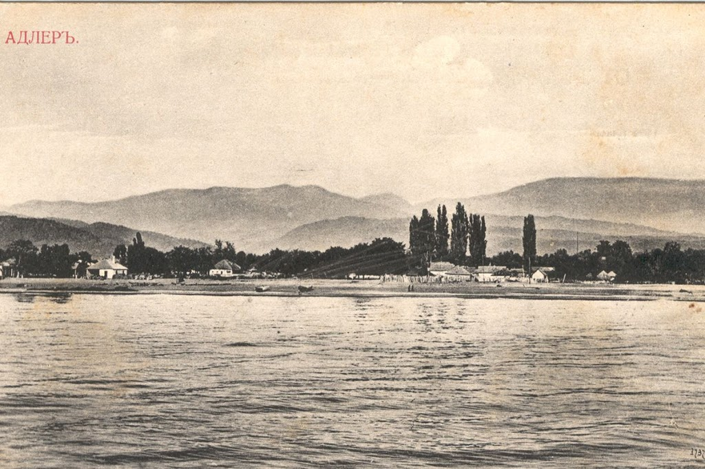 Вид с моря на Адлер. Фото 1910 года